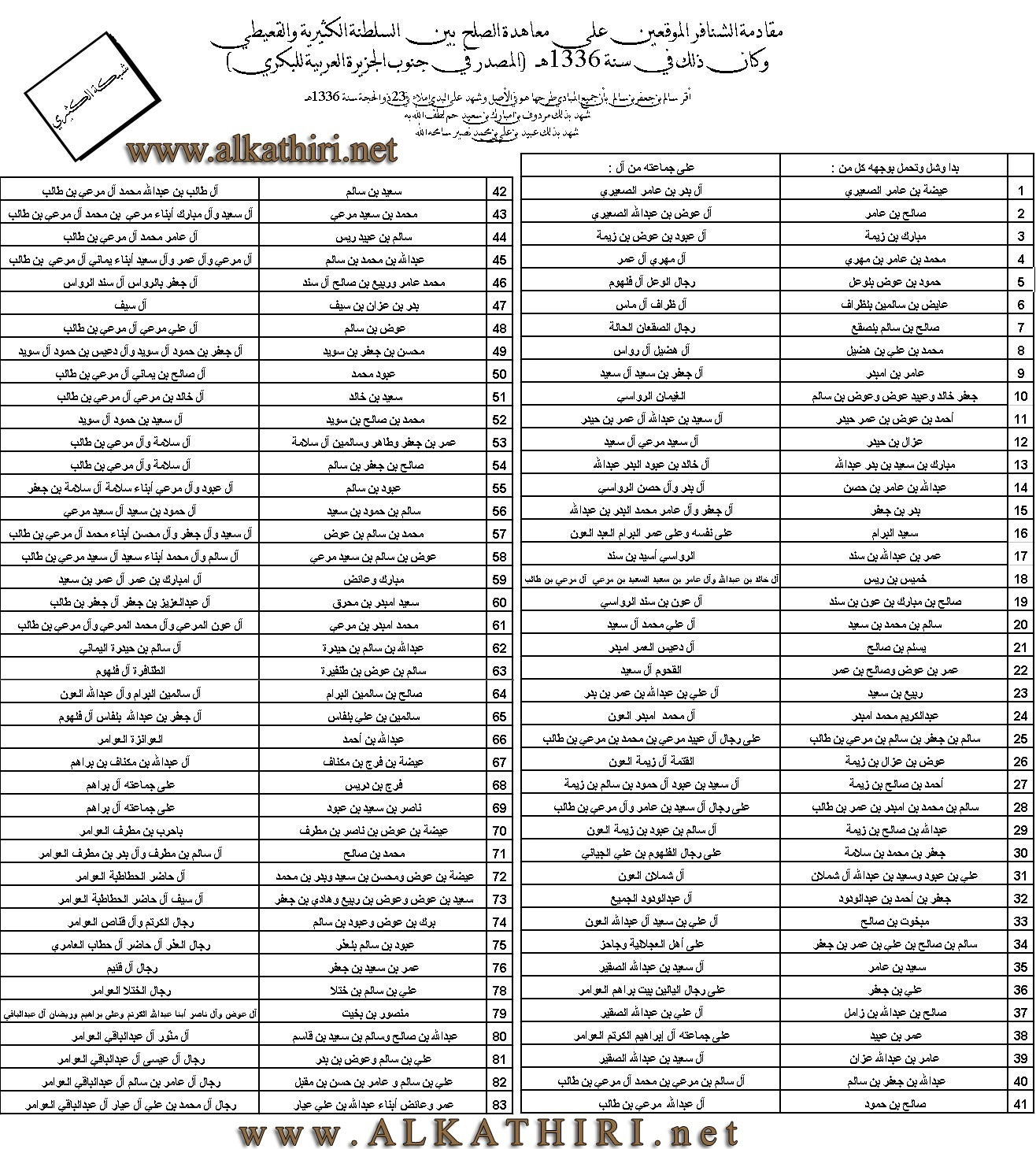 معاهدة الصلح بين السلطنة الكثيرية و القعيطية و الصلح بين قبيلة أل كثير و قبيلة يافع عام 1937 م